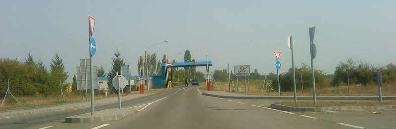 Horvát határ a beremendi határátkelő után